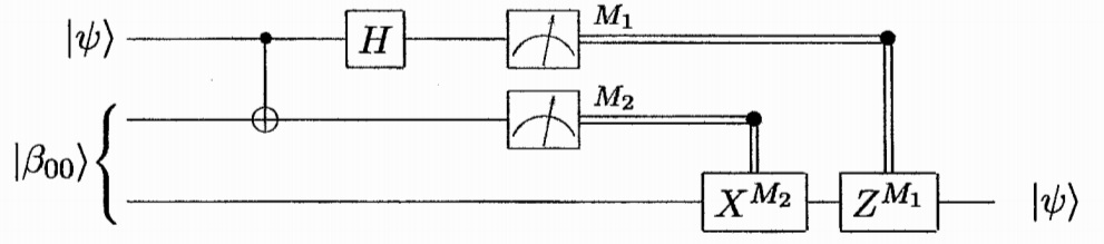 Esquema típico del proceso de teleportación cuántica. Se utiliza el primero de los estado de Bell pero sería posible este proceso con cualquier otro.